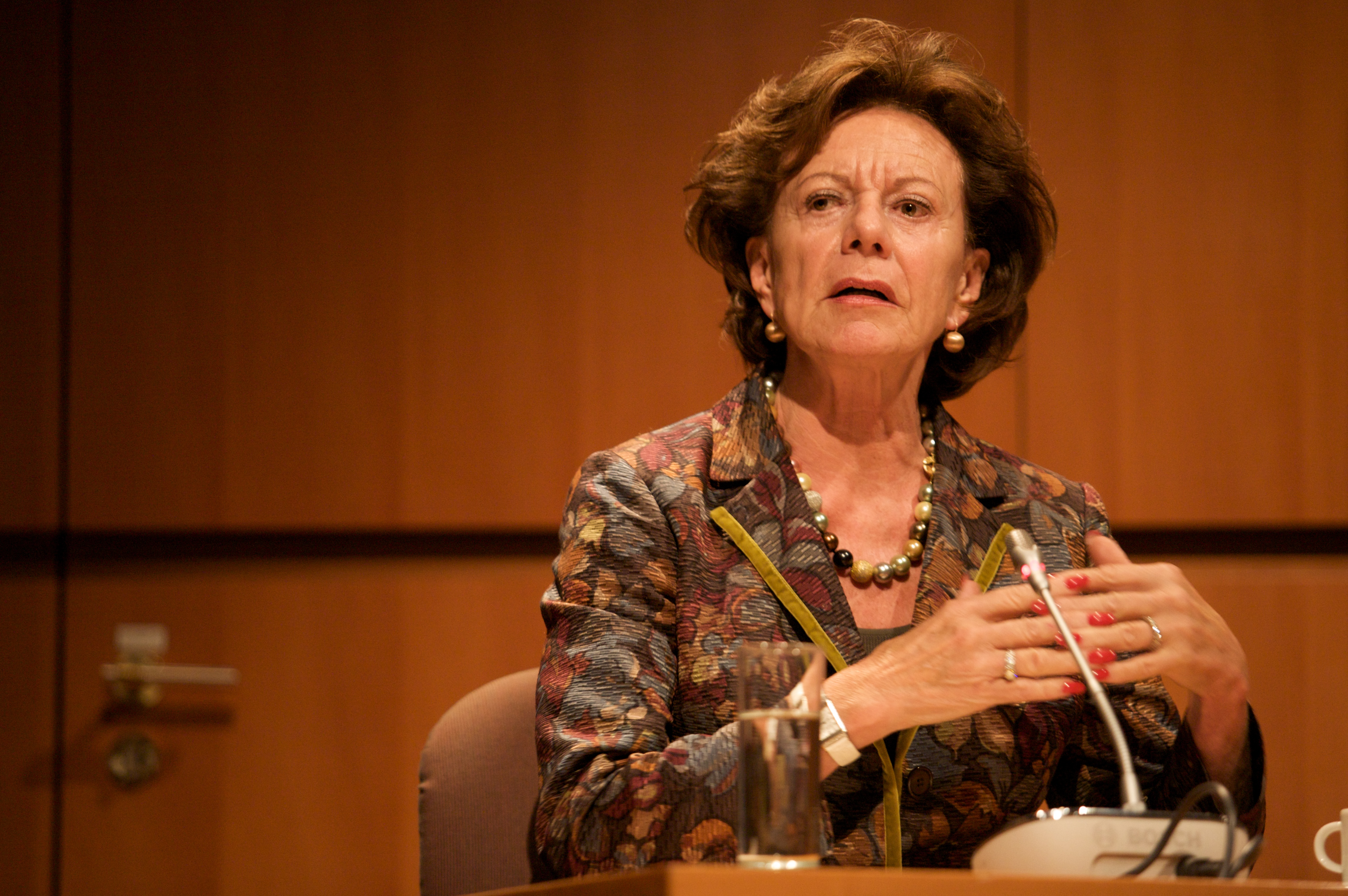 NOG Brussel: Neelie Kroes